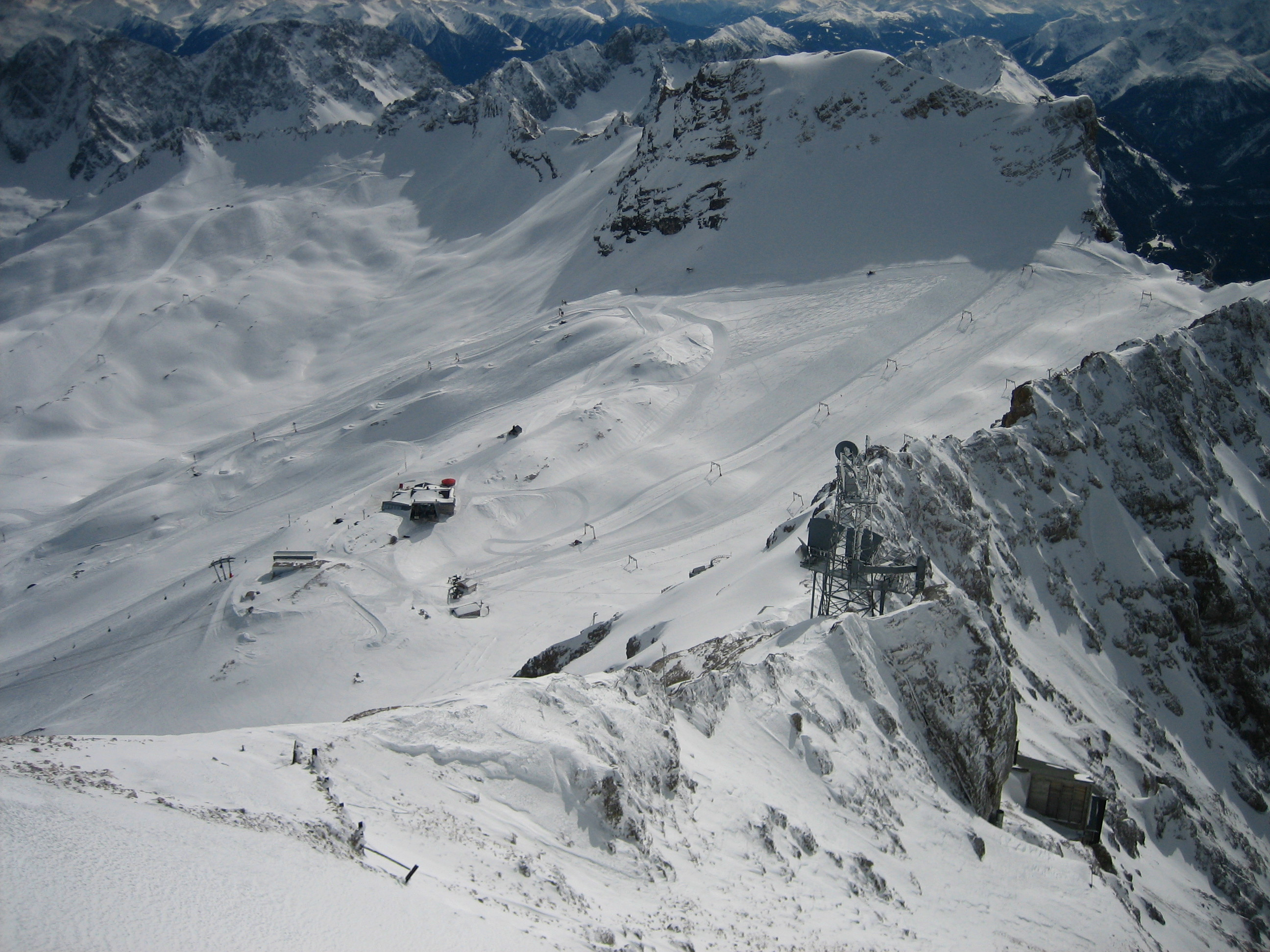 Zugspitzplatt von der Gipfelplattform aus gesehen; obere Skipisten; in der Mitte der Zugspitzbahnhof Sonn Alpin (2600m)